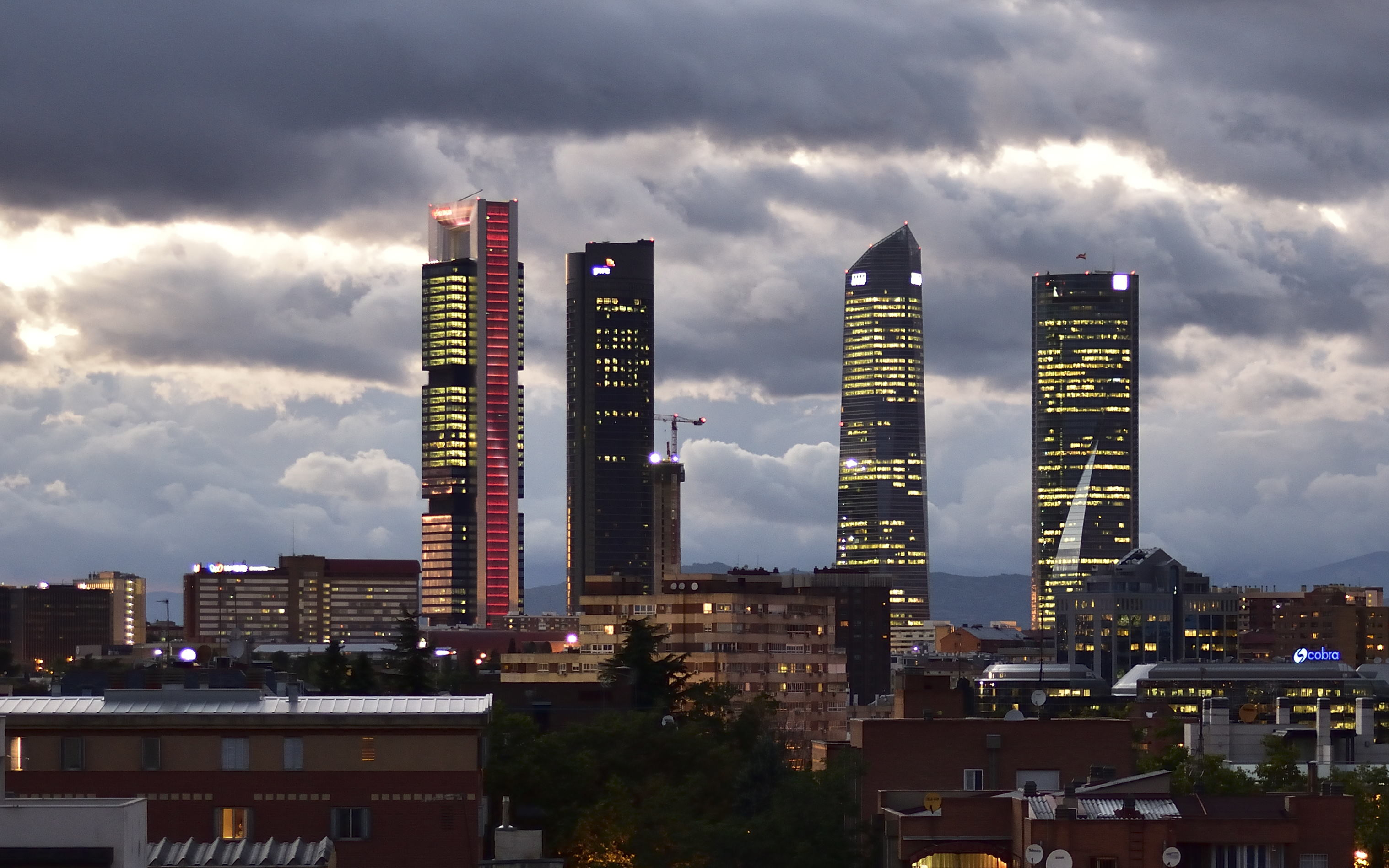 Madrid